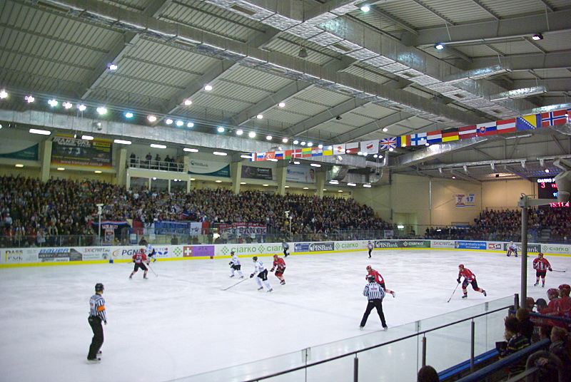 Zawodnicy Ciarko PBS Bank Sanok podczas piątego meczu finałowego o Mistrzostwo Polski 2011/2012 z ComArch Cracovią (Arena Sanok, 14 marca 2012)